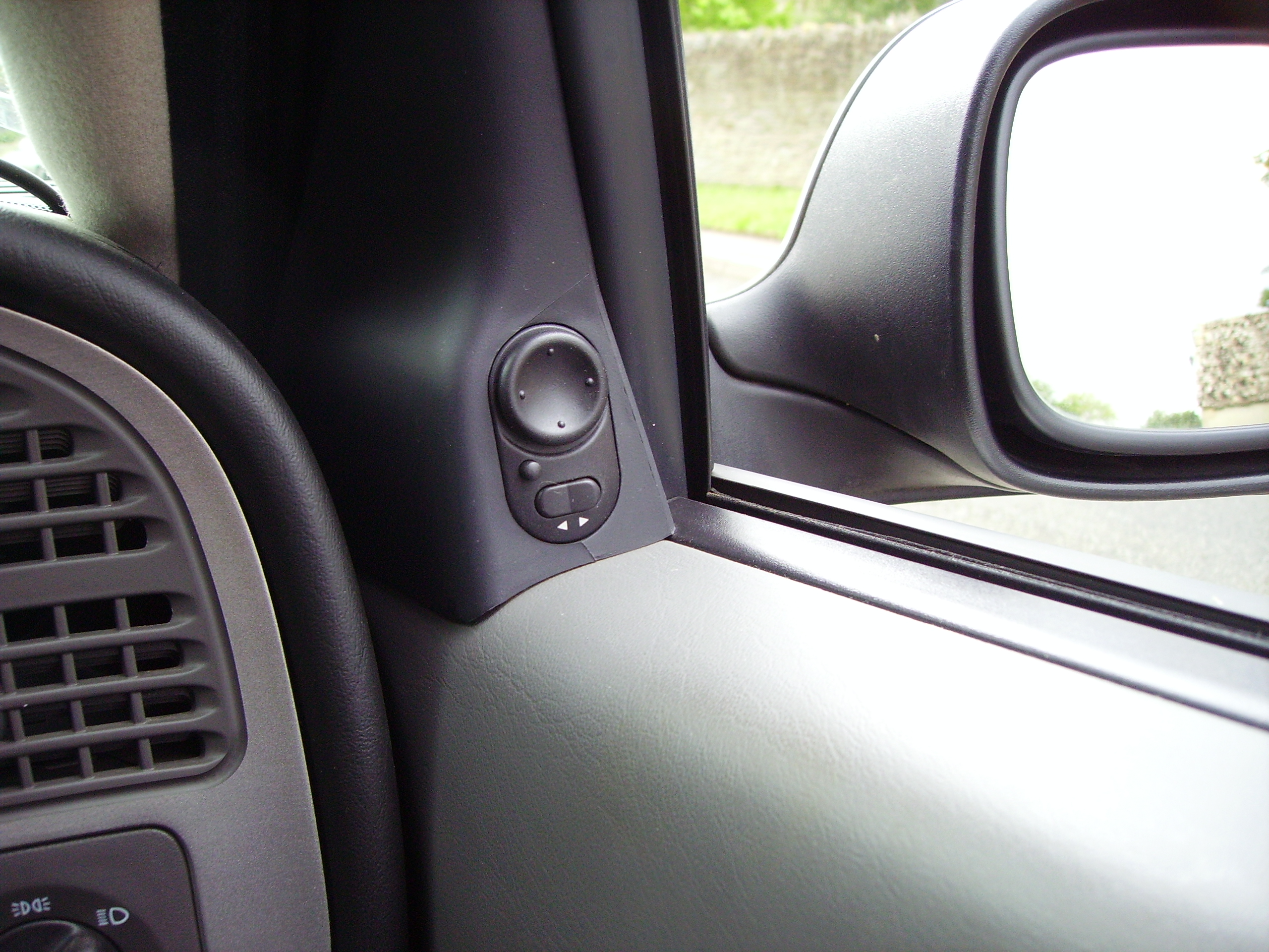 Side-view mirror control (Saab 9-5)